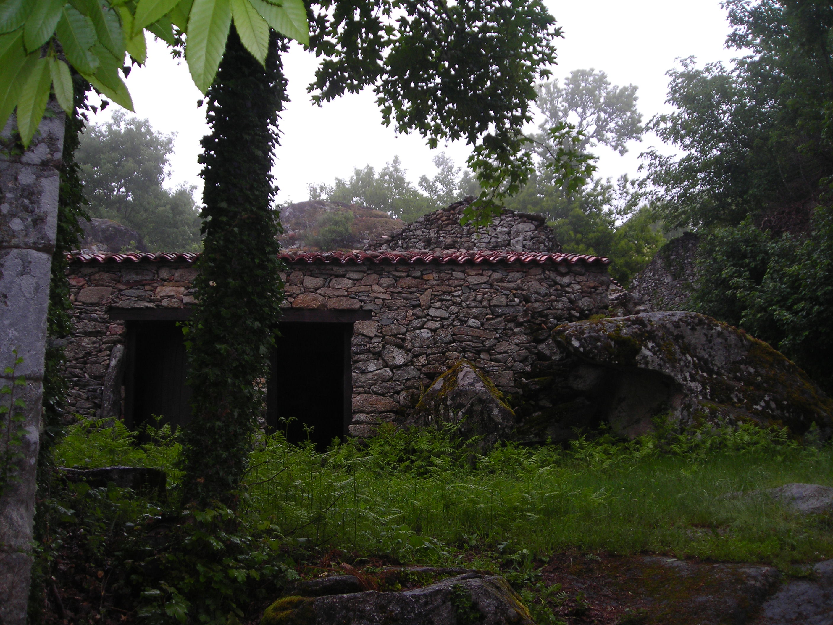 sequeiros